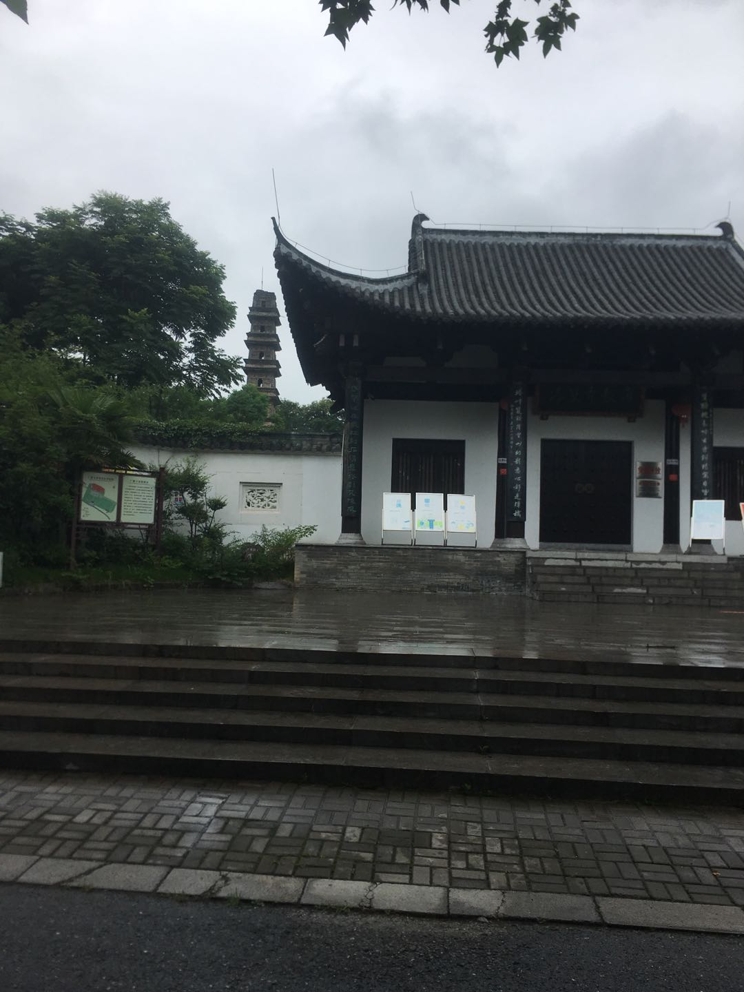 中文（中国大陆）: 广教寺双塔之二